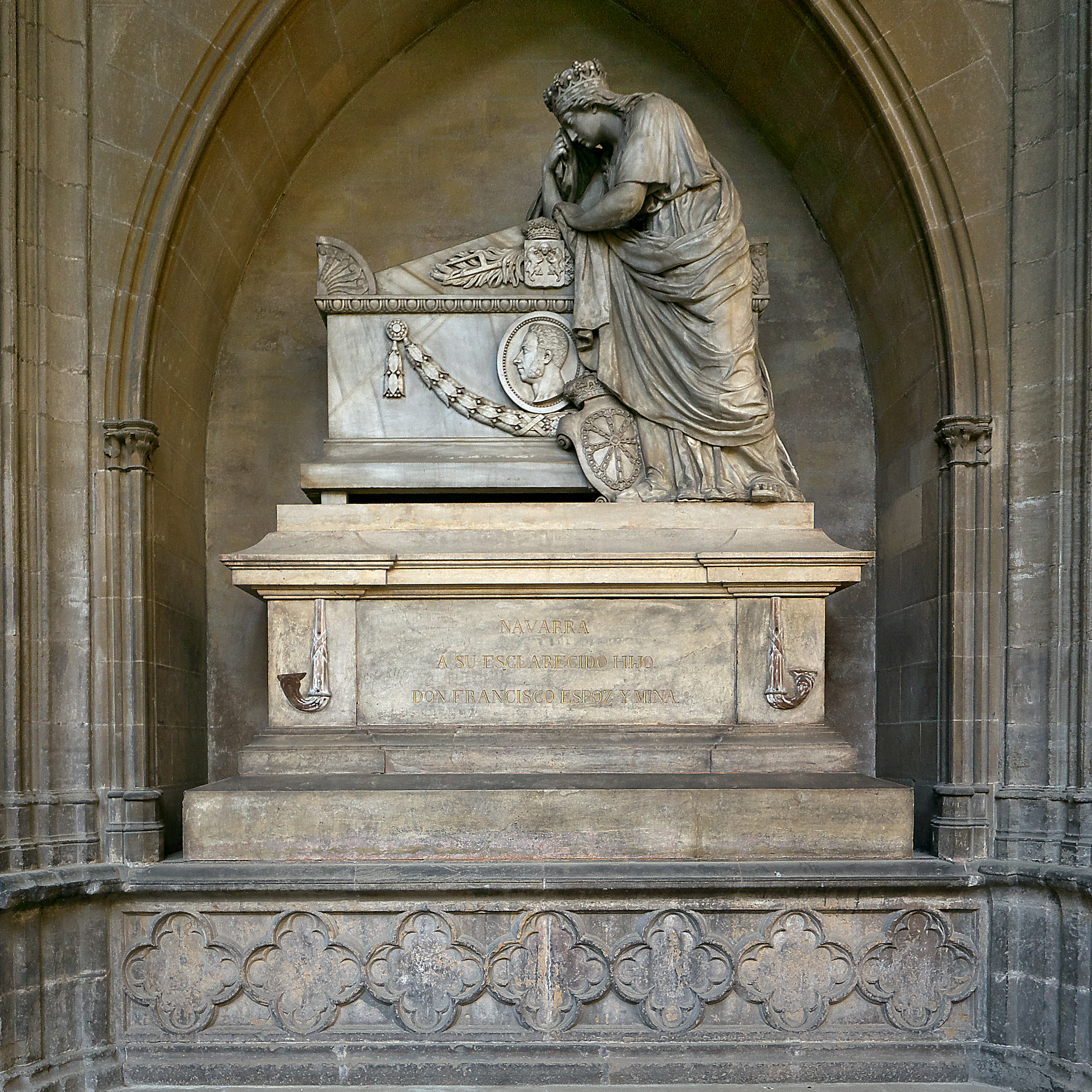 Claustro de la Catedral de Pamplona. Mausoleo del general Francisco Espoz y Mina (†1836), esculpido por José Piquer Duart en 1855.